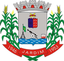 Brasão das armas do Município de Jardim.